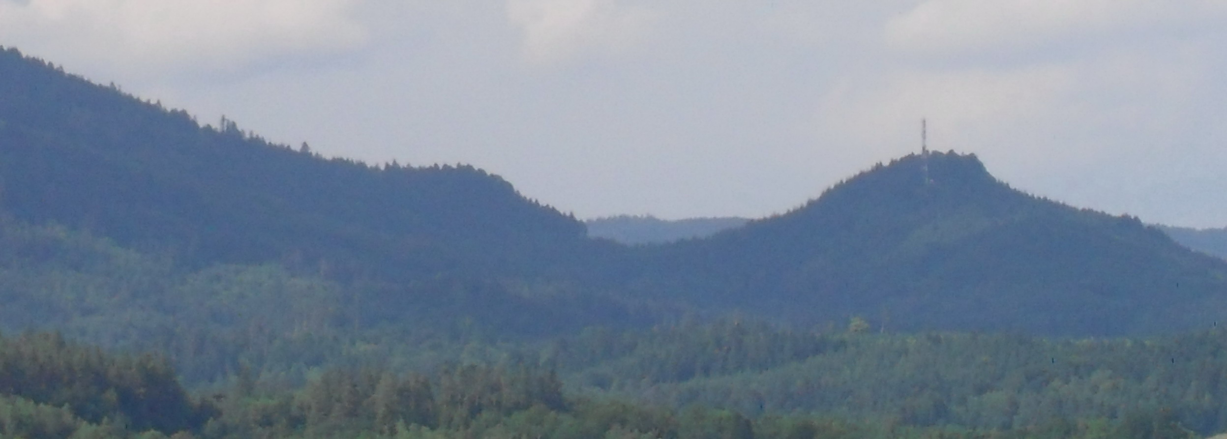 Monticule du Spitzemberg à droite et pente orientale du massif de l'Ormont à gauche, observés depuis le haut du lacet de la route menant à Remémont. Photographie format jipeg redécoupée et réduite en taille. L'espace au premier plan du cliché initial, pris en 2012 vers le nord-est, correspondait à la vallée de la Fave.